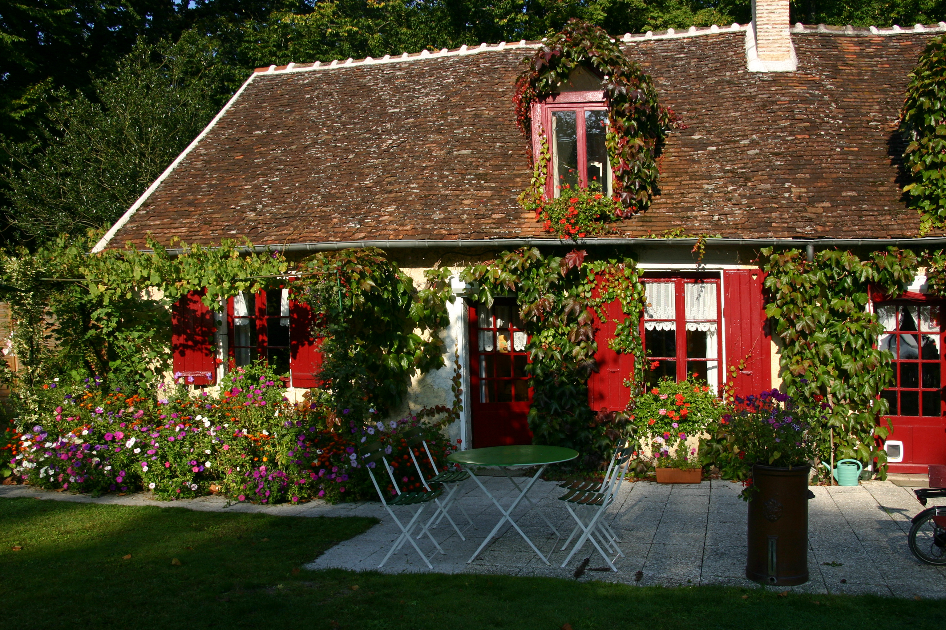 Gästehaus La Flanerie in Cour-Cheverny